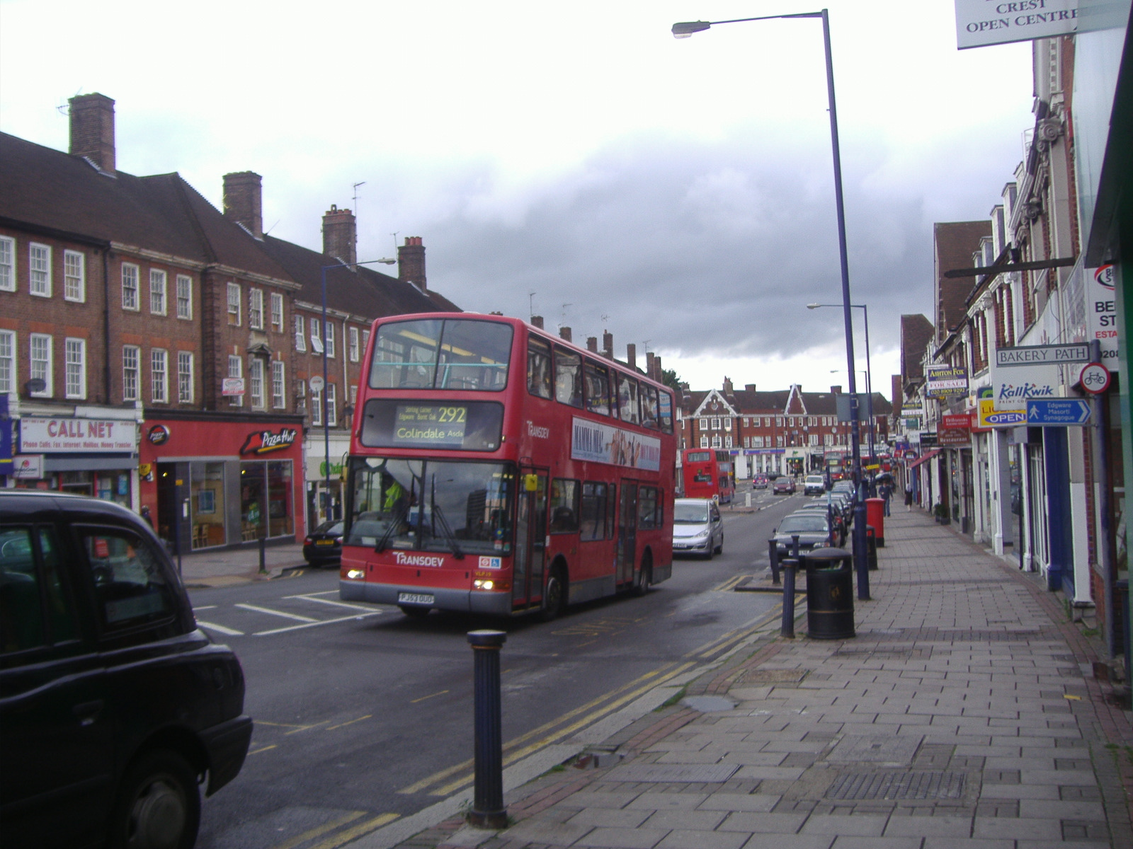 292 Edgware